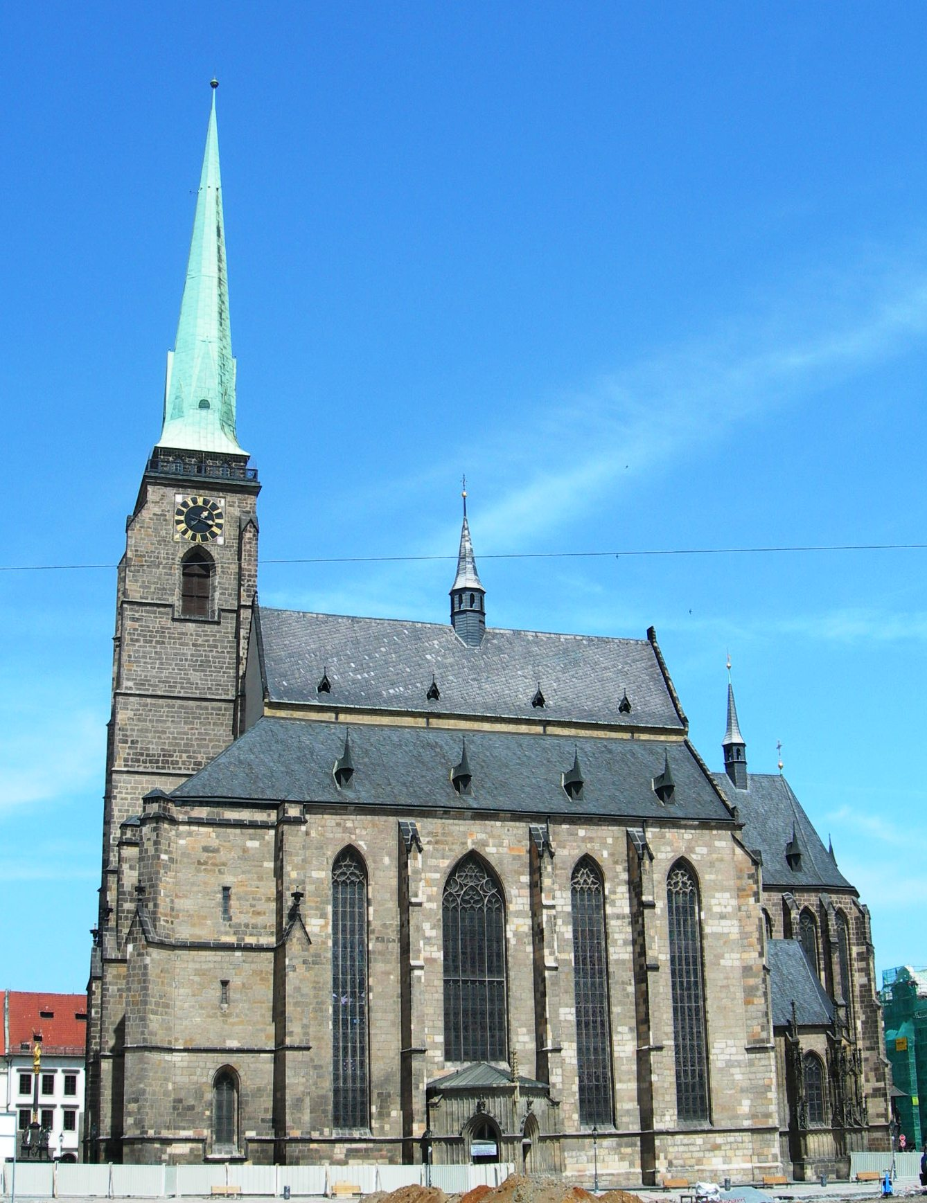 Plzeň, katedrála sv. Bartoloměje (cca 1290 - 1360)